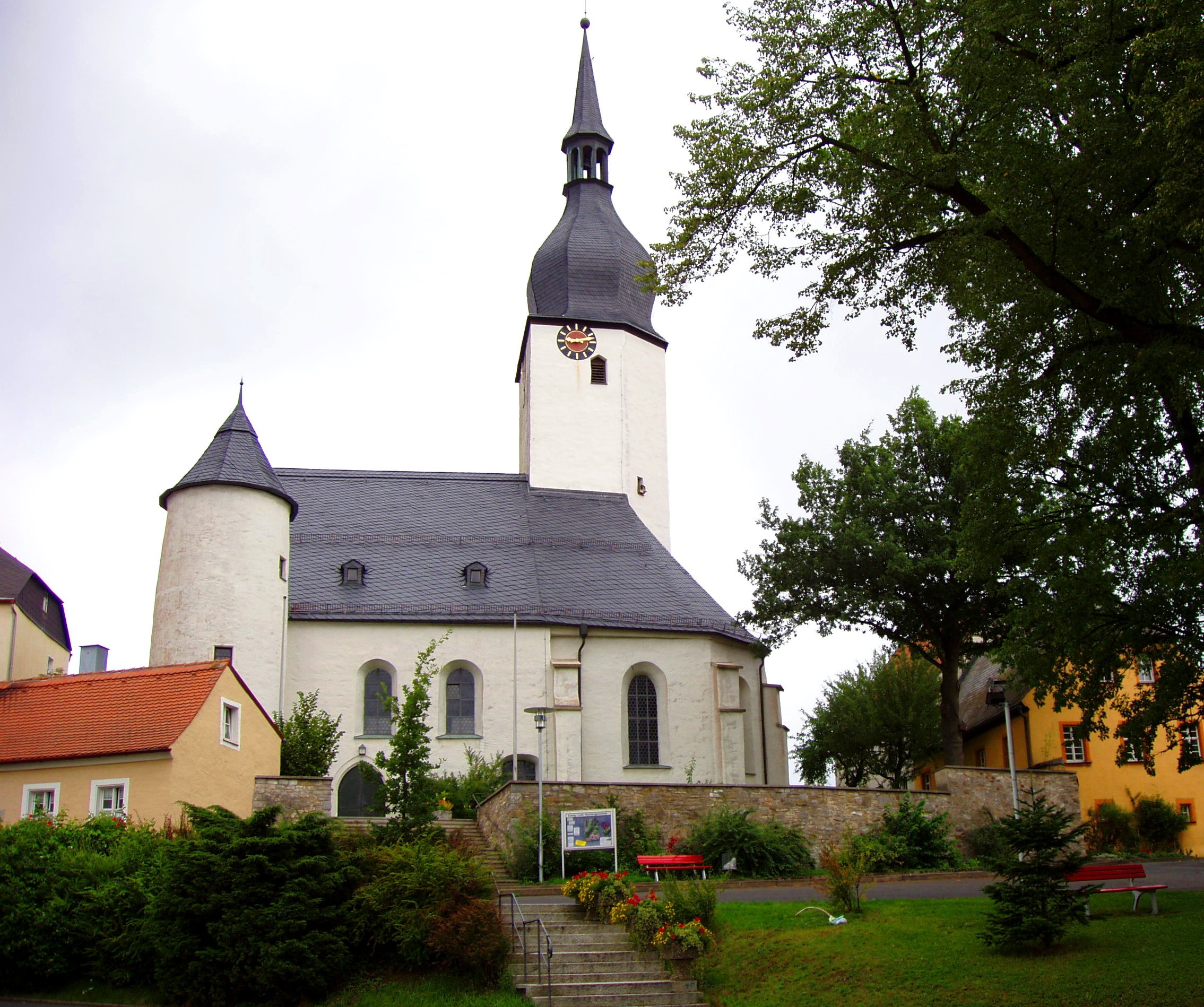 Evangelische Kirche St. Ägidius in Thiersheim aus der spätromanischen Zeit